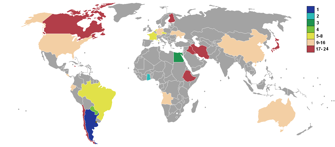 Copa diputada en Argentina en 2001